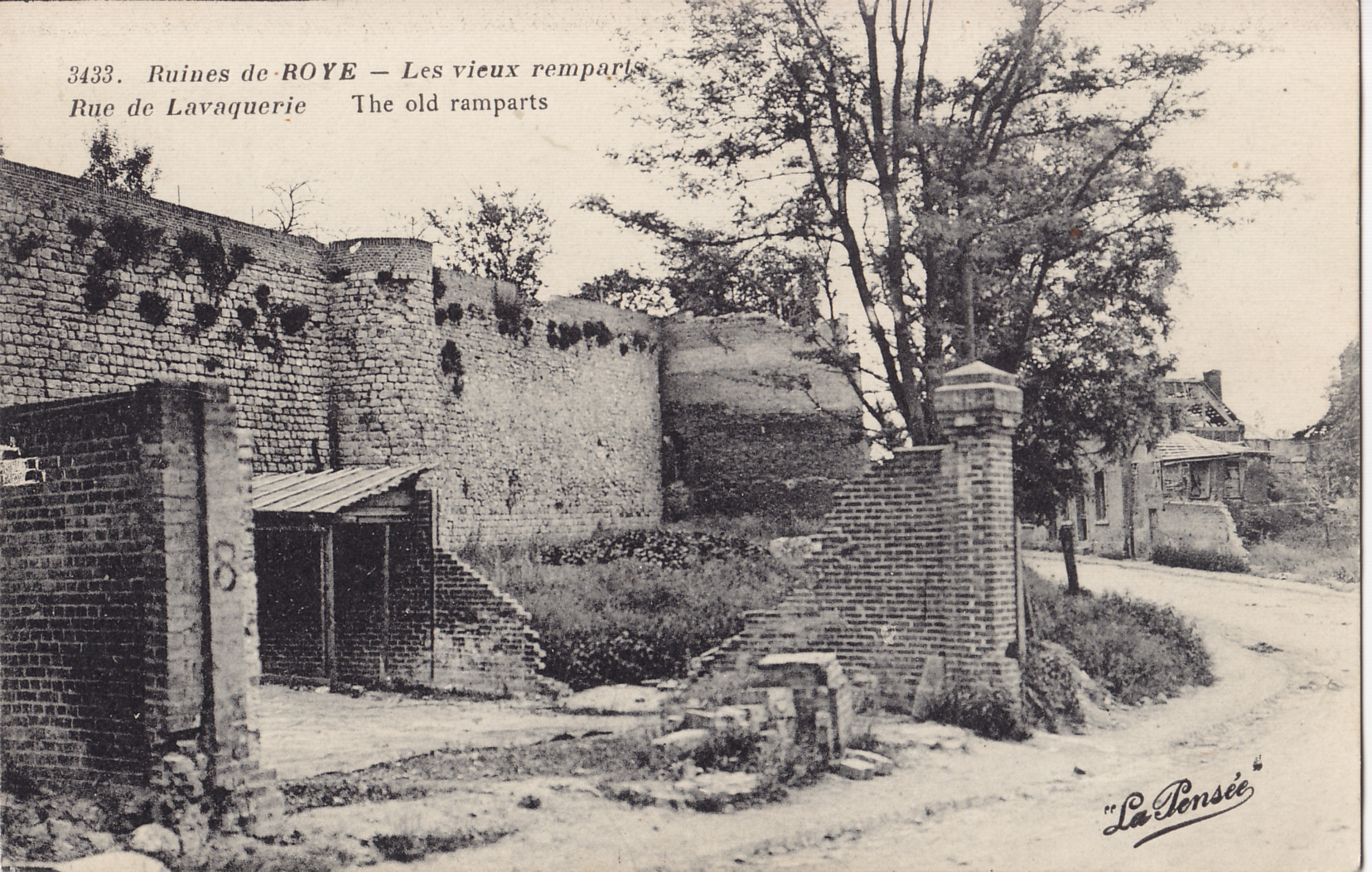 Carte postale ancienne éditée par La Pensée, n°3433 :Ruines de ROYE - Les vieux remparts - Rue de Lavacquerie